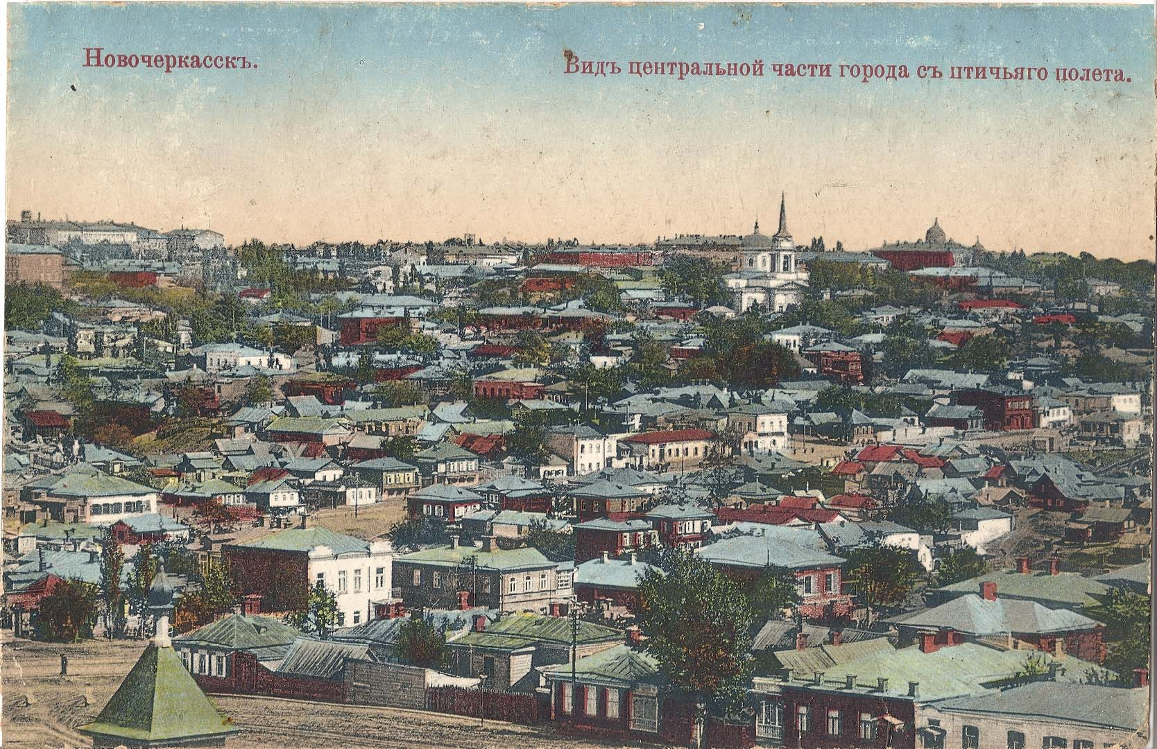 Новочеркасск, виды с высоты птичьего полета